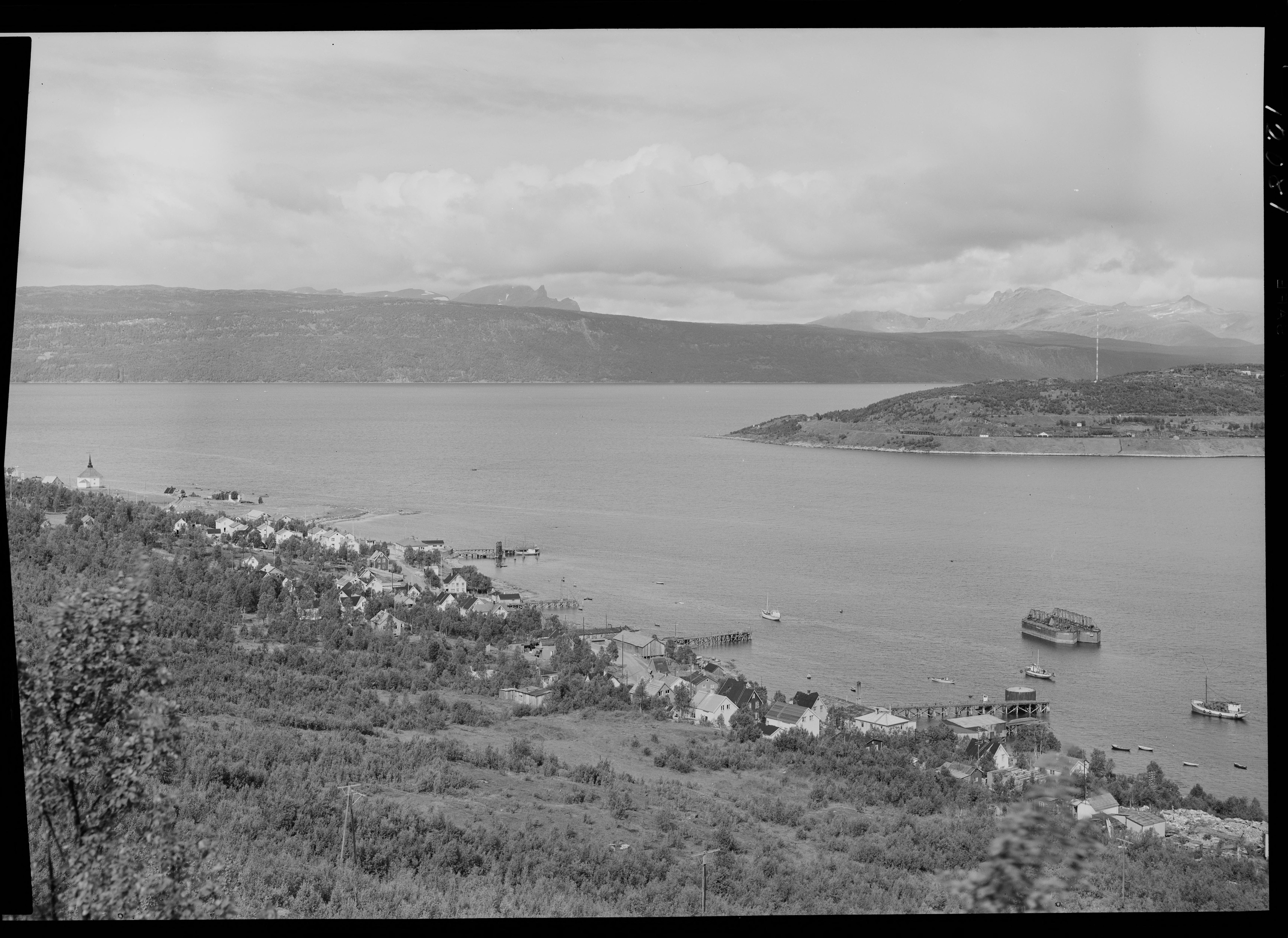 Bildet er hentet fra Nasjonalbibliotekets bildesamling Ankenes, Narvik, Nordland